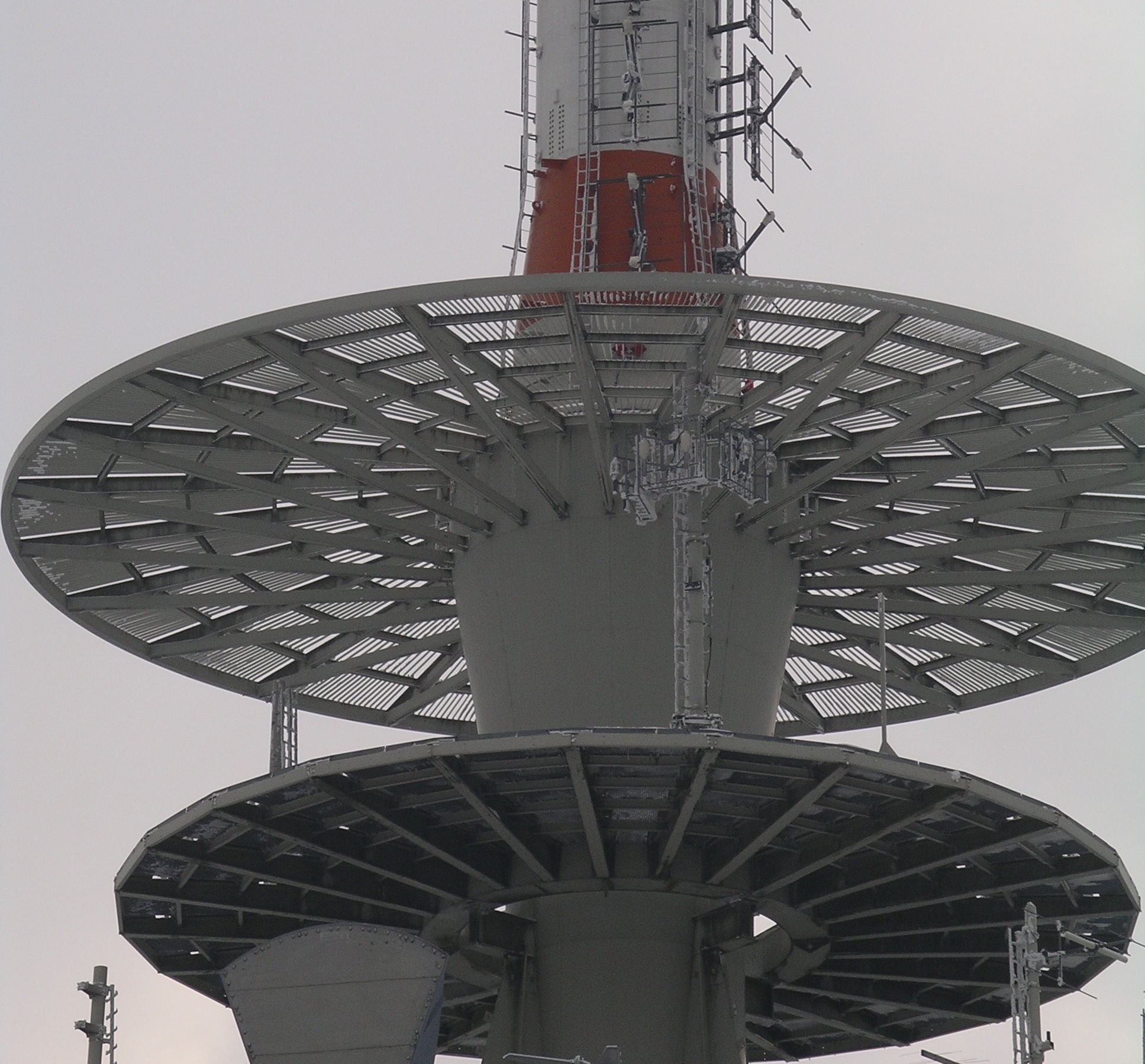 Sender Inselsberg Sendeantenne VHF Band III